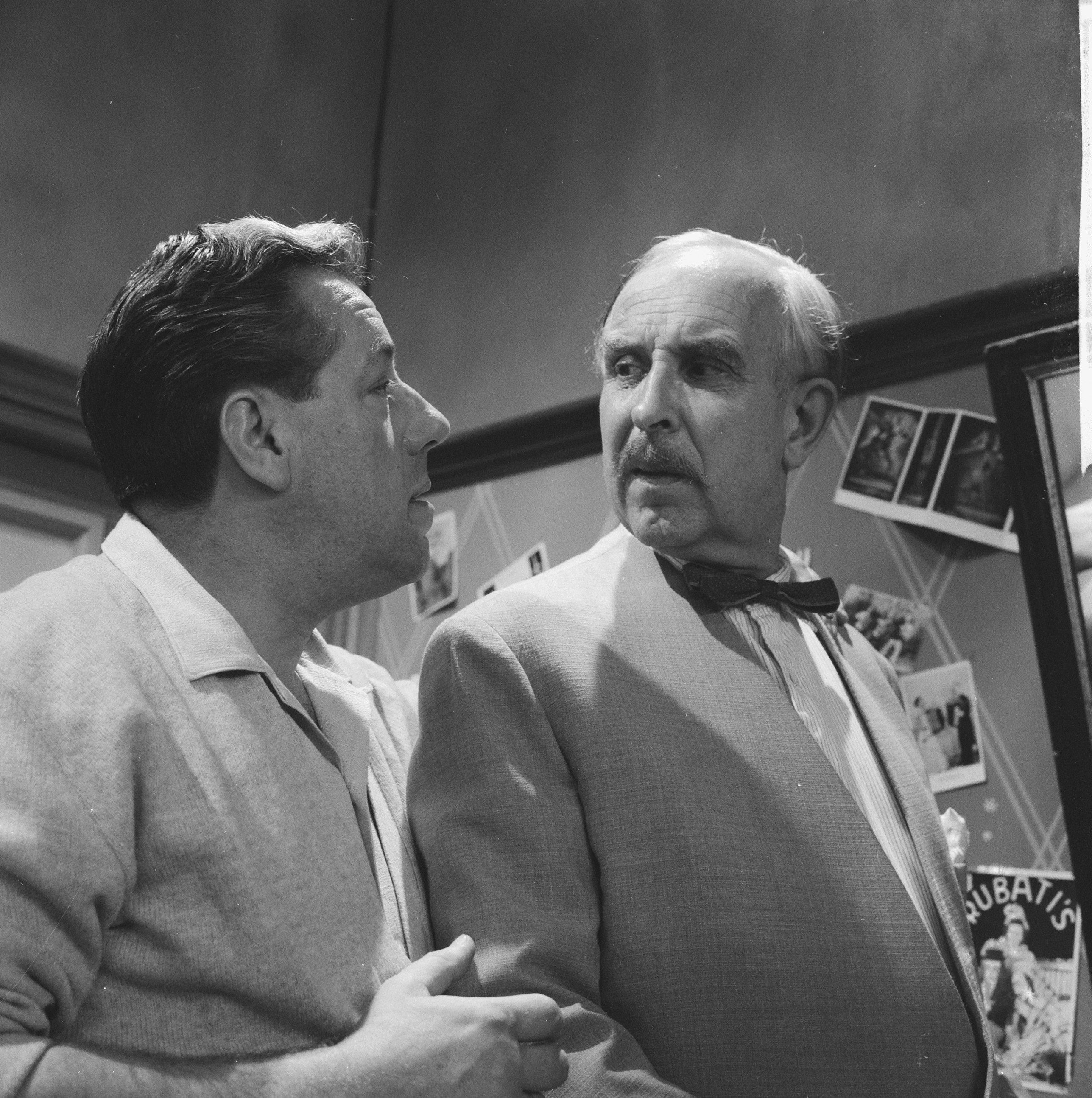 Collectie / Archief : Fotocollectie Anefo Reportage / Serie : [ onbekend ] Beschrijving : TV-spel "De komiek". Hans Tiemeyer (rechts) en Ko van Dijk Datum : 25 april 1962 Trefwoorden : acteurs, televisiedrama's Persoonsnaam : Dijk, Ko van, Tiemeyer, Hans Fotograaf : Koch, Eric / Anefo Auteursrechthebbende : Nationaal Archief Materiaalsoort : Negatief (zwart/wit) Nummer archiefinventaris : bekijk toegang 2.24.01.03 Bestanddeelnummer : 913-8094 Reacties Geplaatst door Televisiespel liefhebber op 27 augustus 2017 - 16:26. AVRO Televisie. TV-spel "De Komiek" van Dimitri Frenkel Frank. Uitgezonden op 26 april 1962 Acteurs Ko van Dijk (l) en Hans Tiemeyer (r)